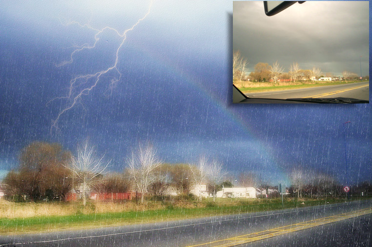 Ejemplo de retoque fotografico.